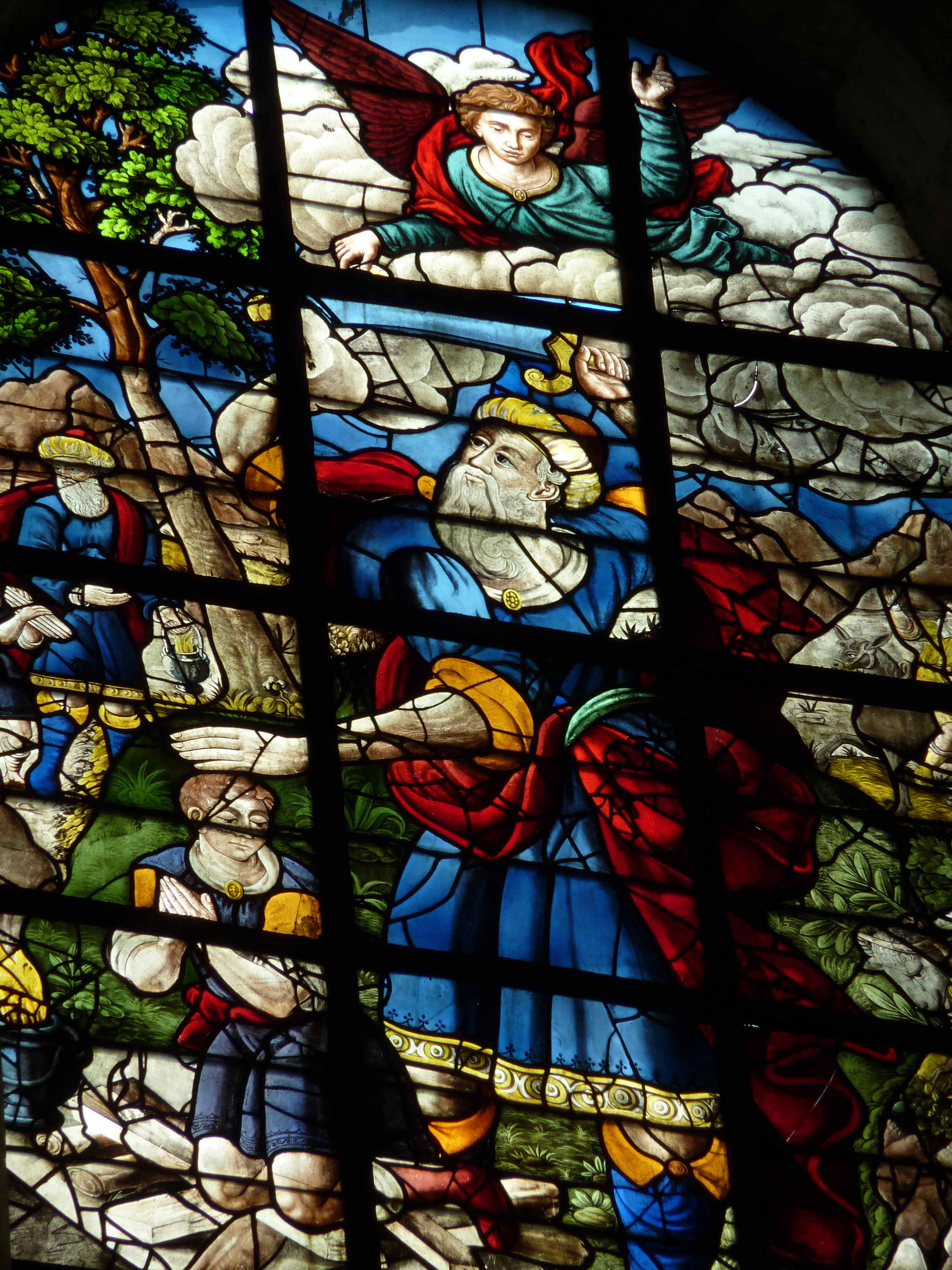 Katholische Kirche Saint-Pierre in Dreux im Département Eure-et-Loir (Centre-Val de Loire/Frankreich), Bleiglasfenster mit der Jahreszahl 1607 in der Stefanuskapelle; Darstellung: Opferung Isaaks, Stifter; Ausschnitt